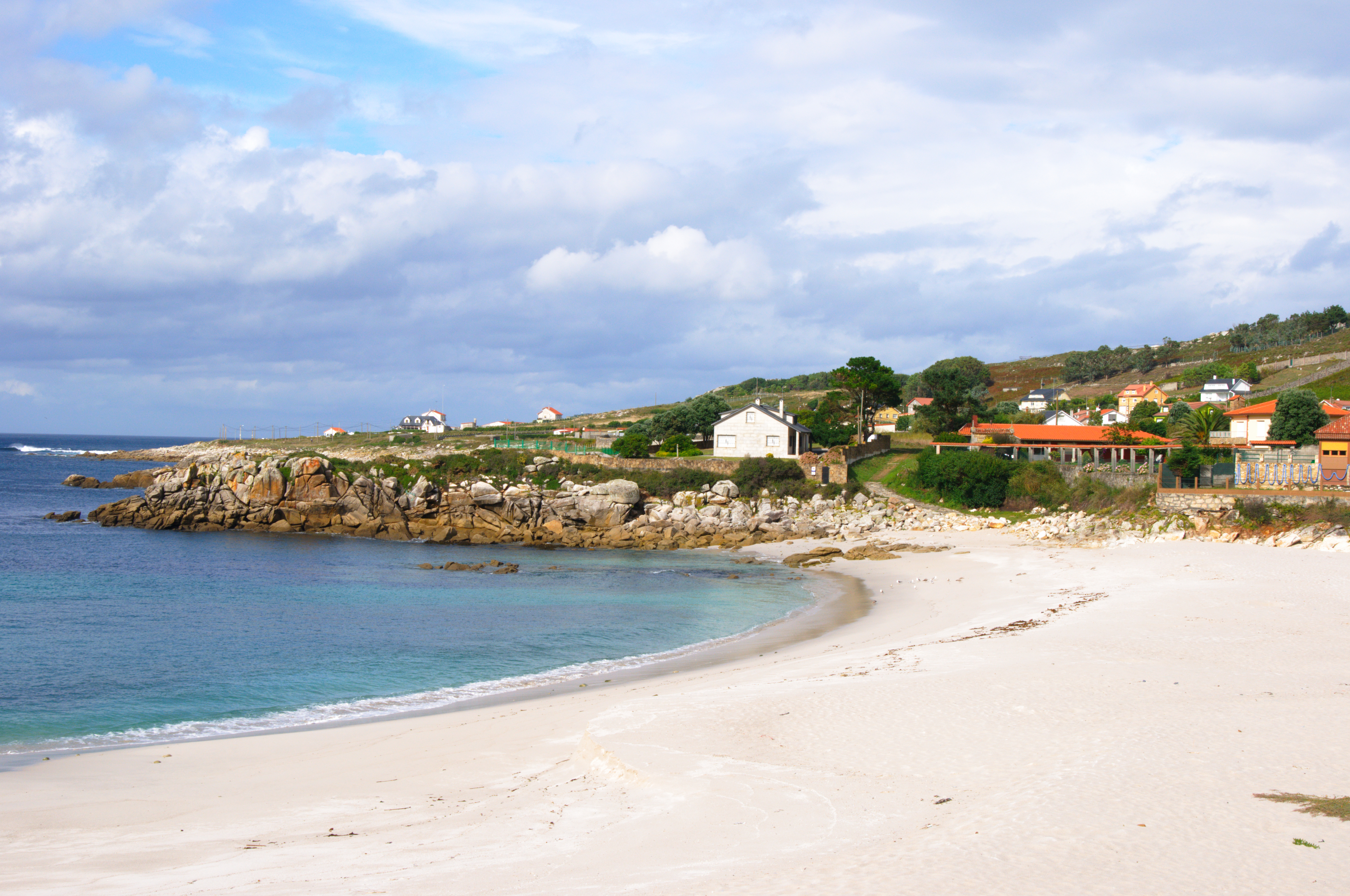 Playa de Barizo